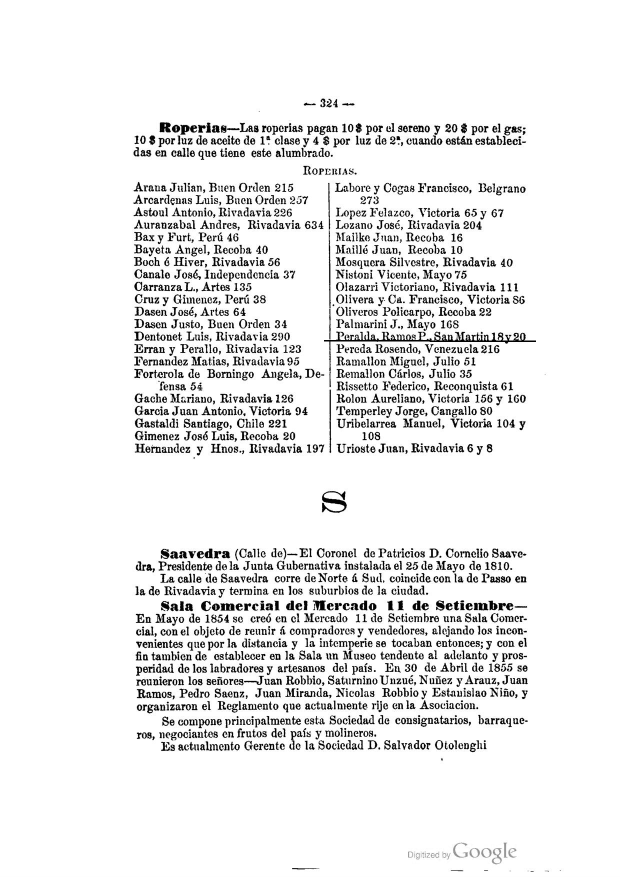 pagina del Diccionario de Buenos Aires, ó sea guia de forasteros 1864